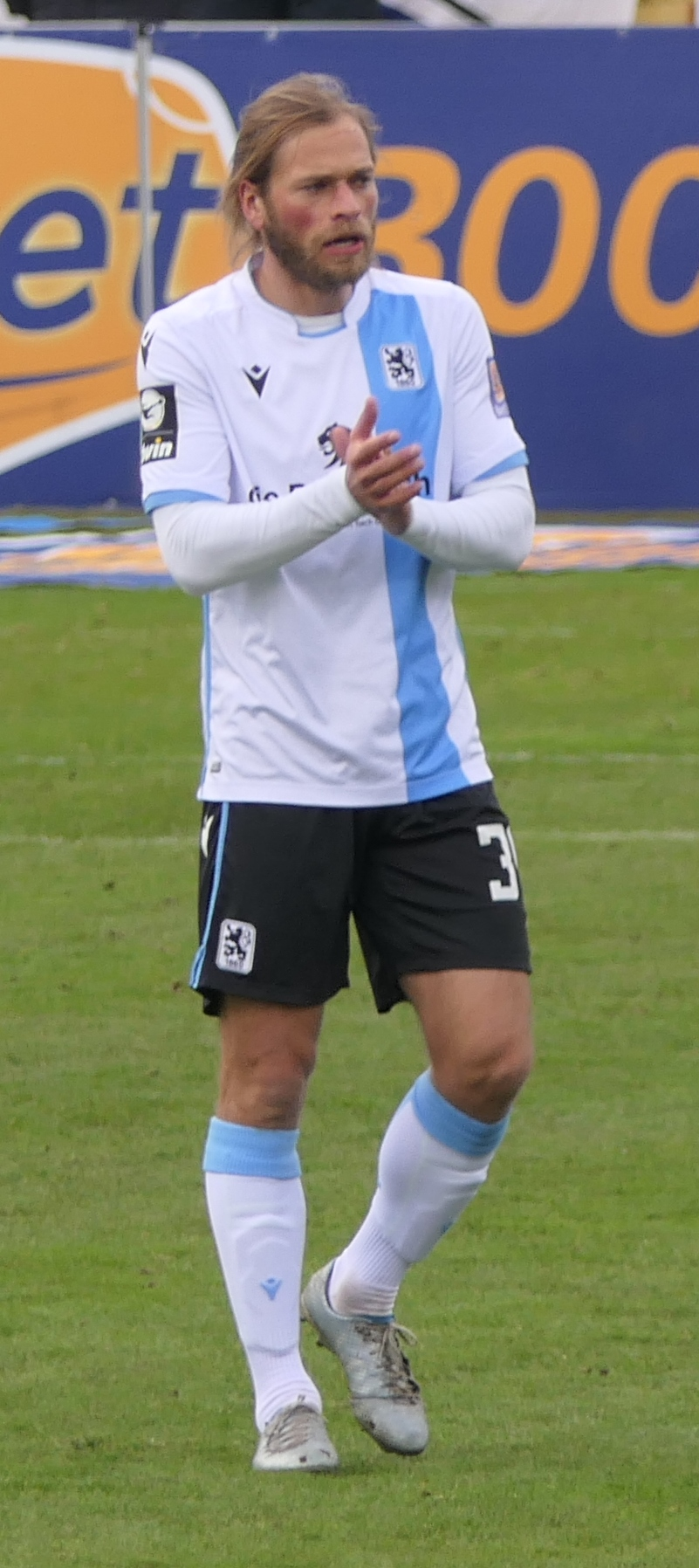 Der Fussballprofi Kristian Böhnlein im Trikot vom TSV 1860 München beim Heimspiel gegen Eintracht Braunschweig am 26.01.2020.